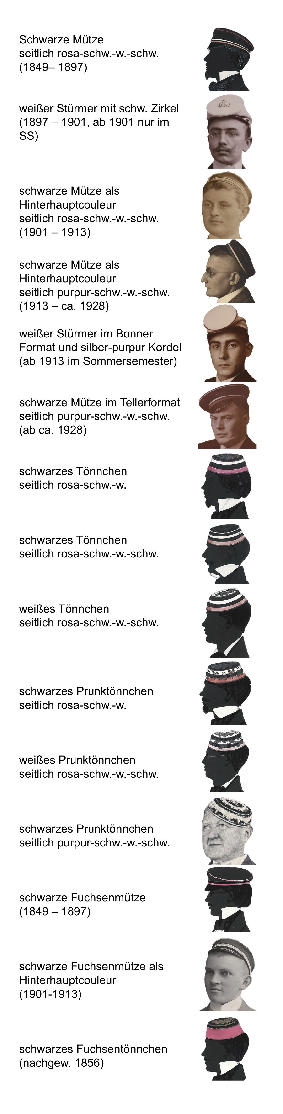 Die unterschiedlichen Mützenformen der Neoborussia